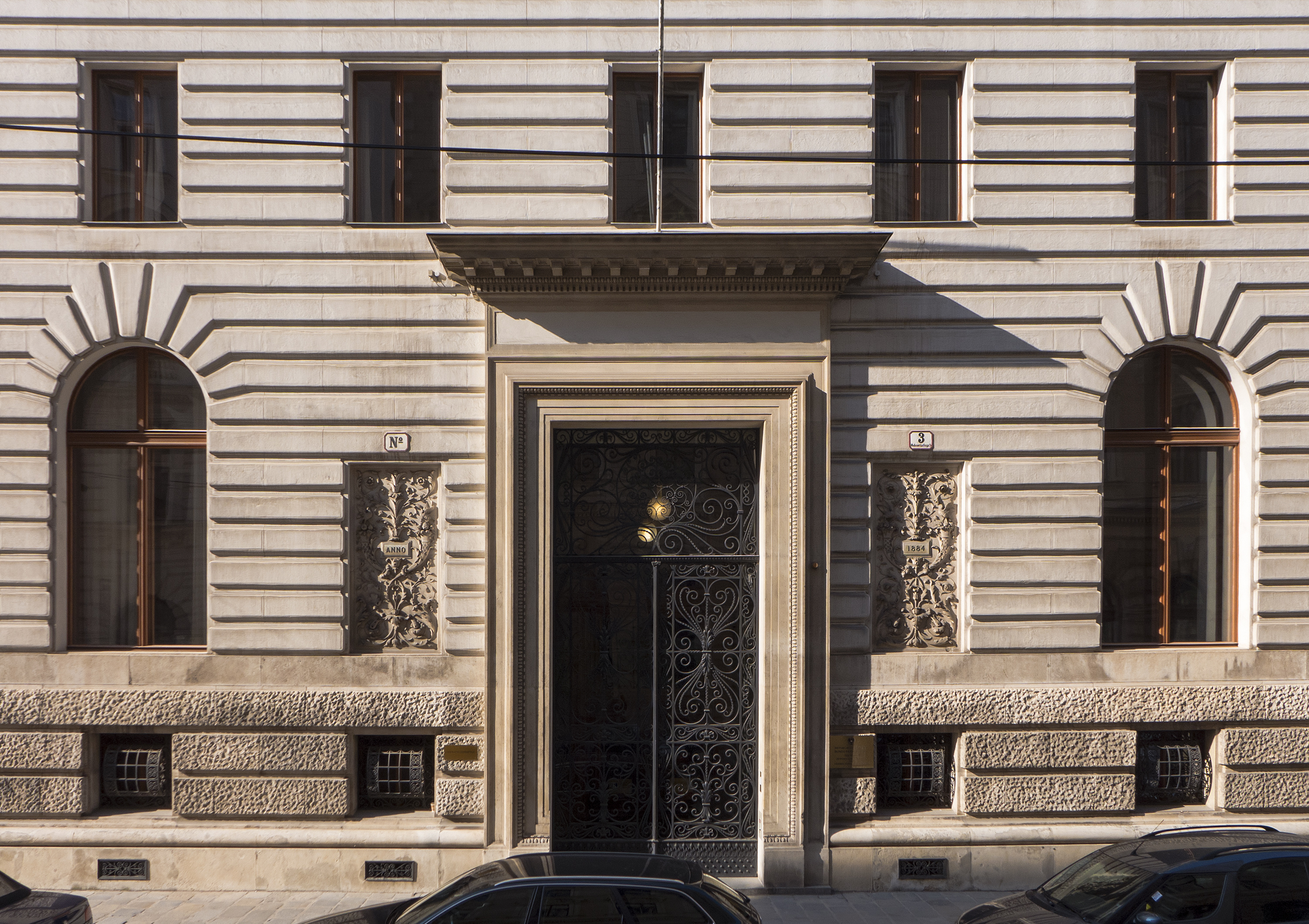 Länderbankzentrale (Hohenstaufengasse) in Wien 1